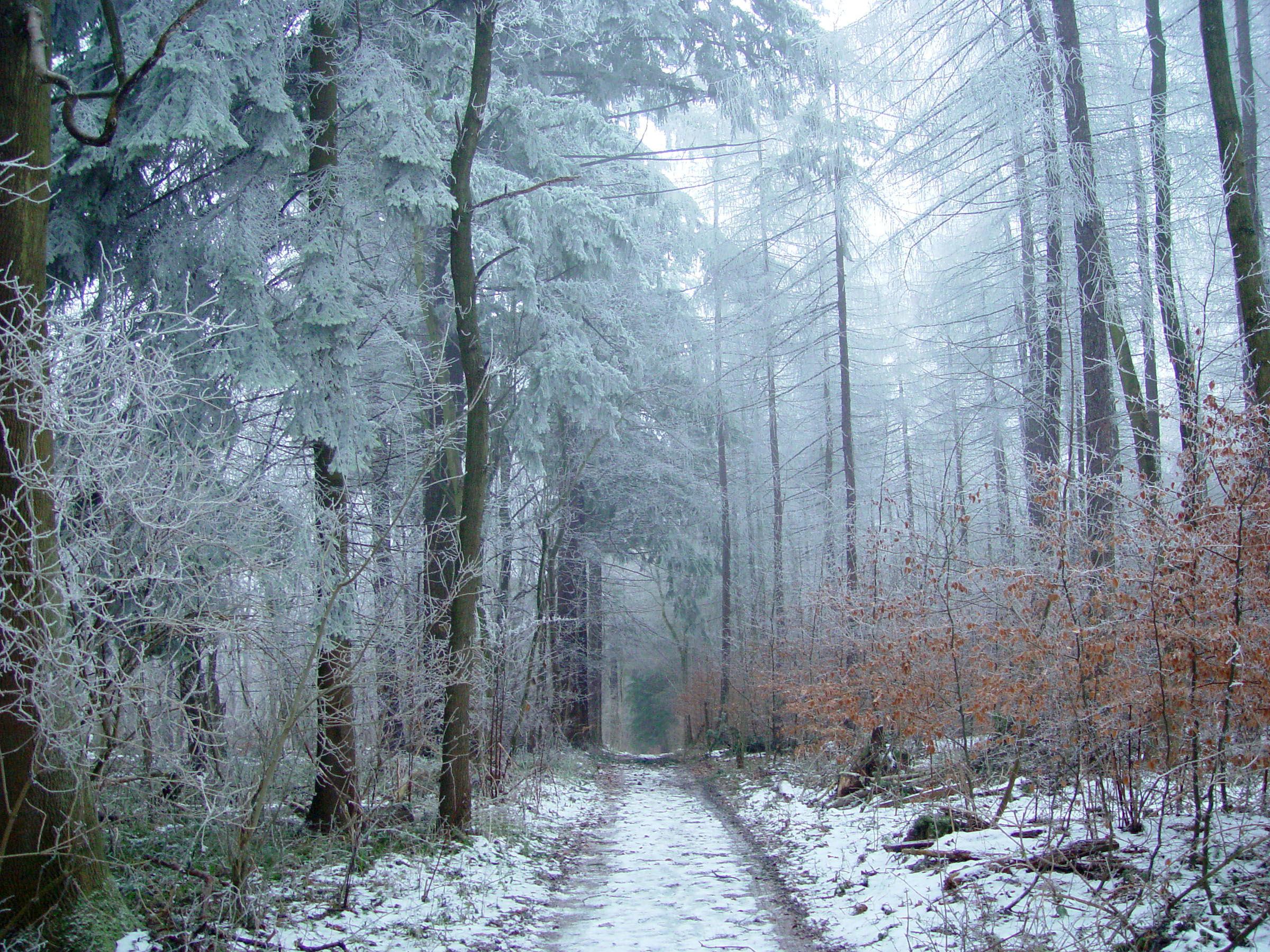 Beschreibung: Der Elm im Winter Aufnahmedatum: 7. Januar 2006 Fotograf: ArtMechanic